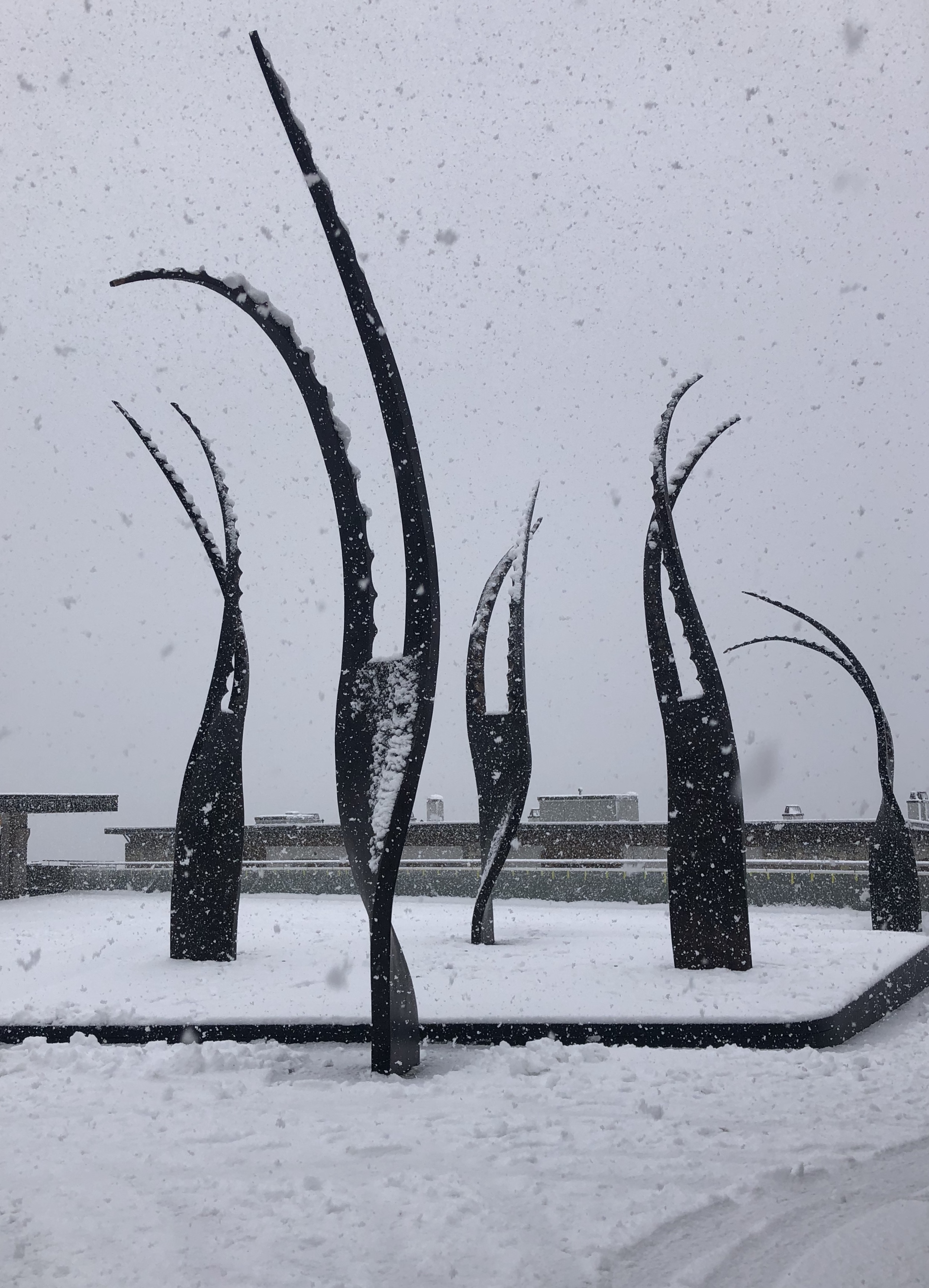 Oeuvre monumentale de Marie Antoinette Gorret, Crans-Montana